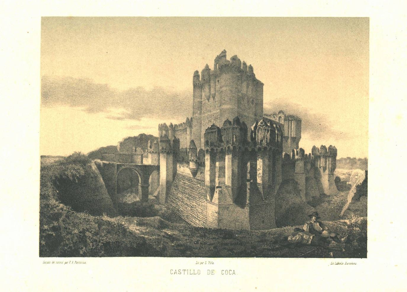 Castillo de Coca